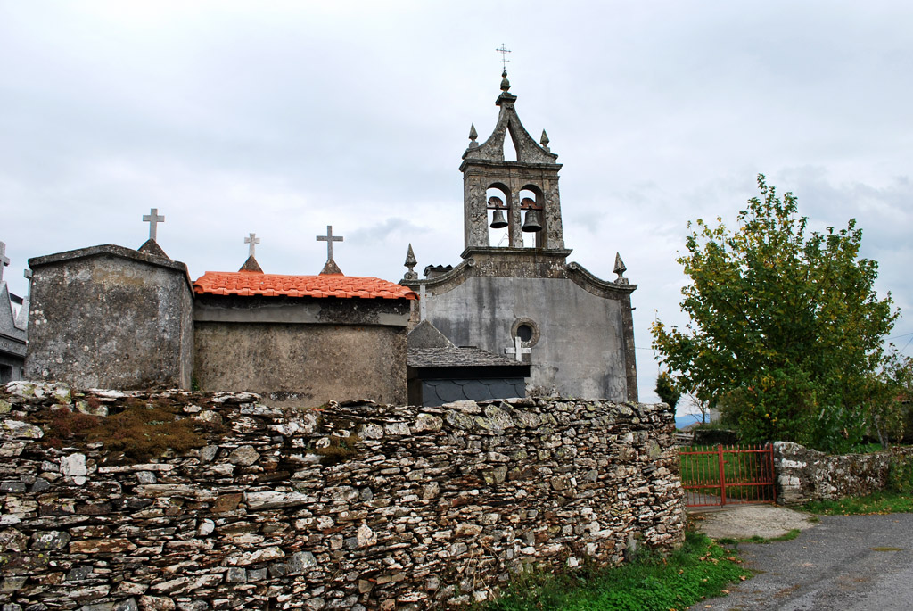 Igrexa de Fiolleda, Monforte de Lemos.